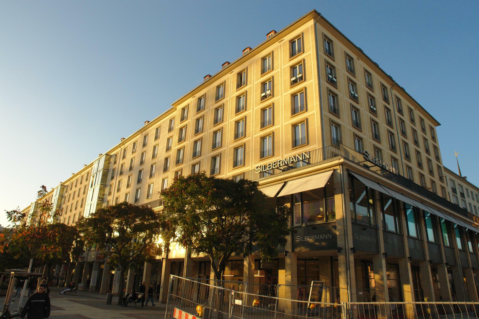 Wilsdruffer Straße 12-22 Dresden